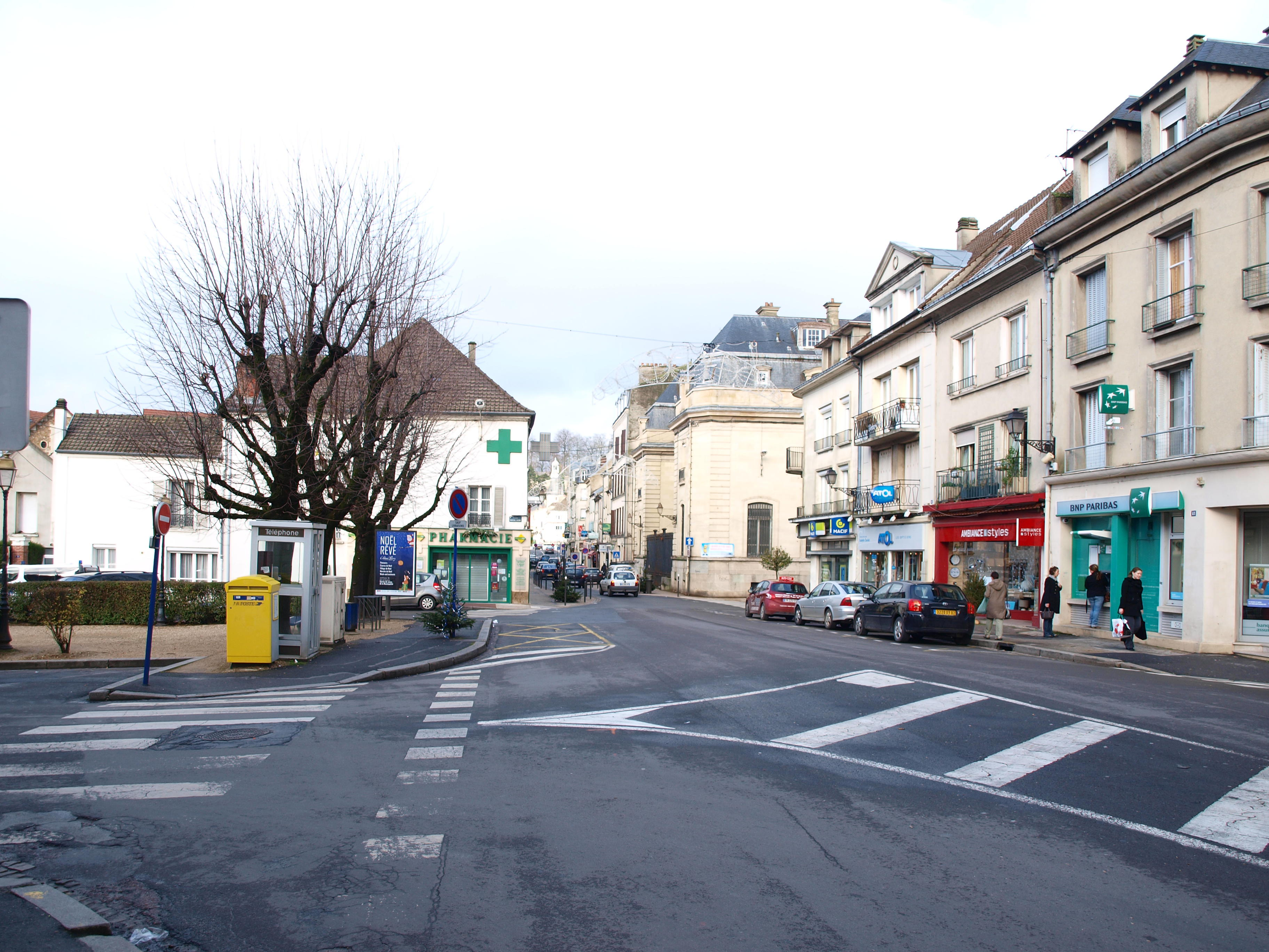 Château-Thierry (Aisne, France)